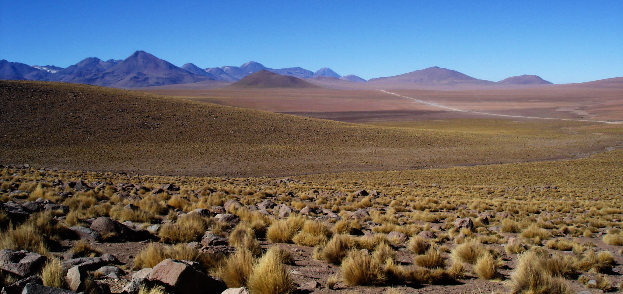 Altiplano chilien